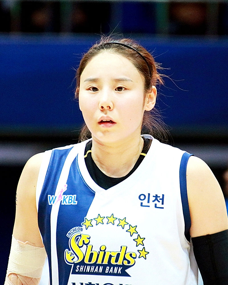 160101 여자농구 신한은행 vs 우리은행 직찍 2